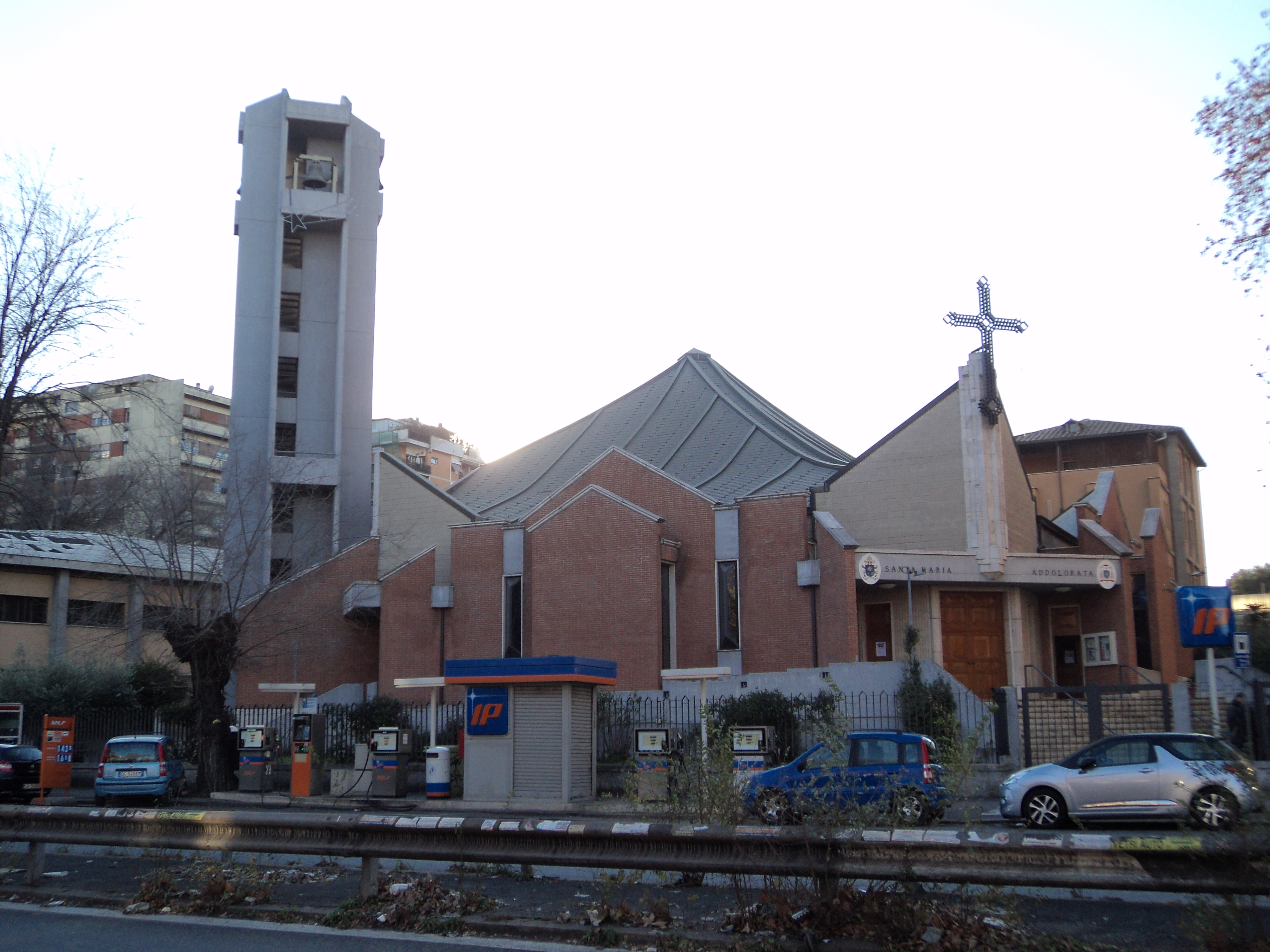 Chiesa di Santa Maria Addolorata (Roma)